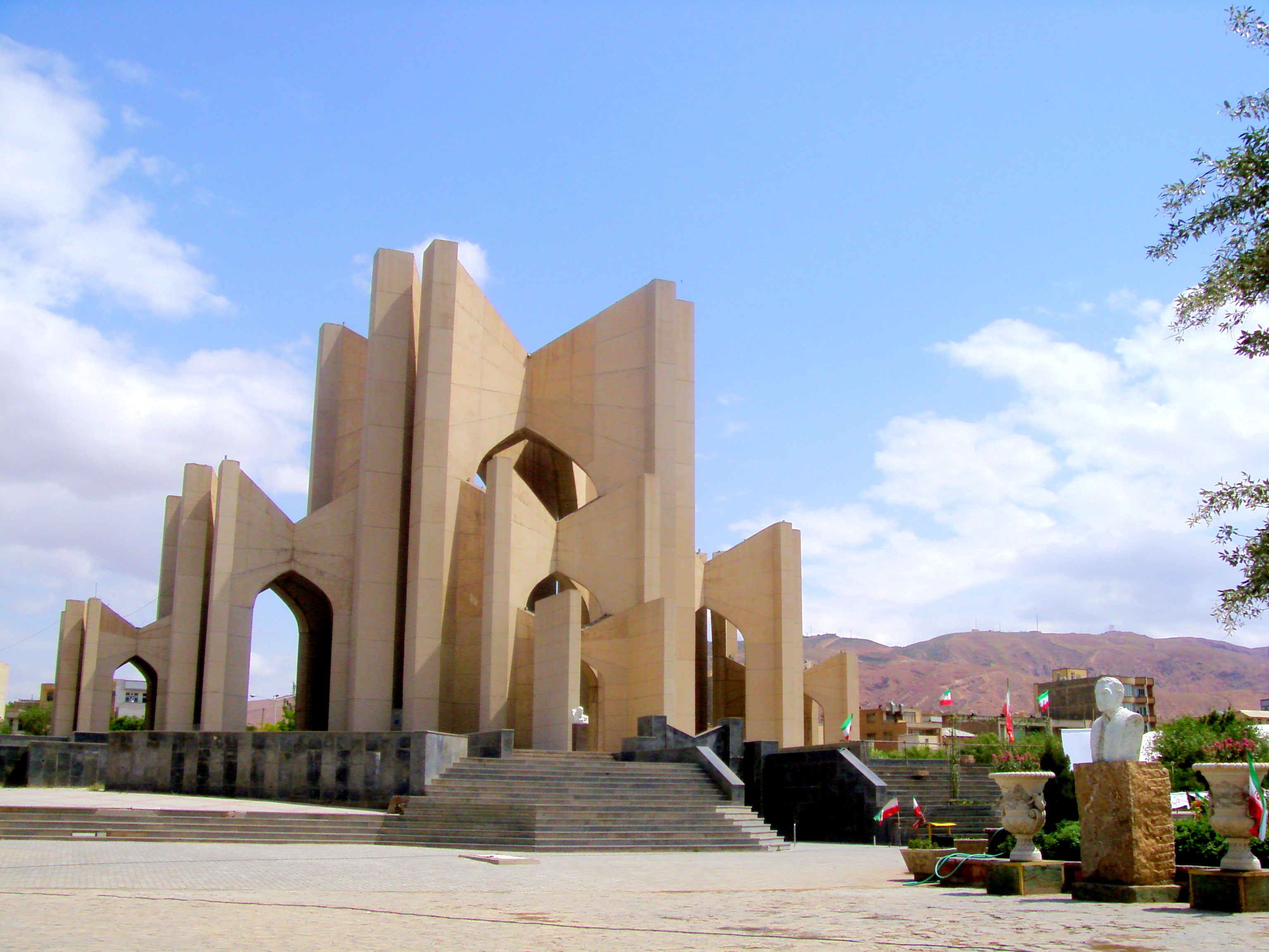 Maqbaratoshoara, Tabriz, Iran